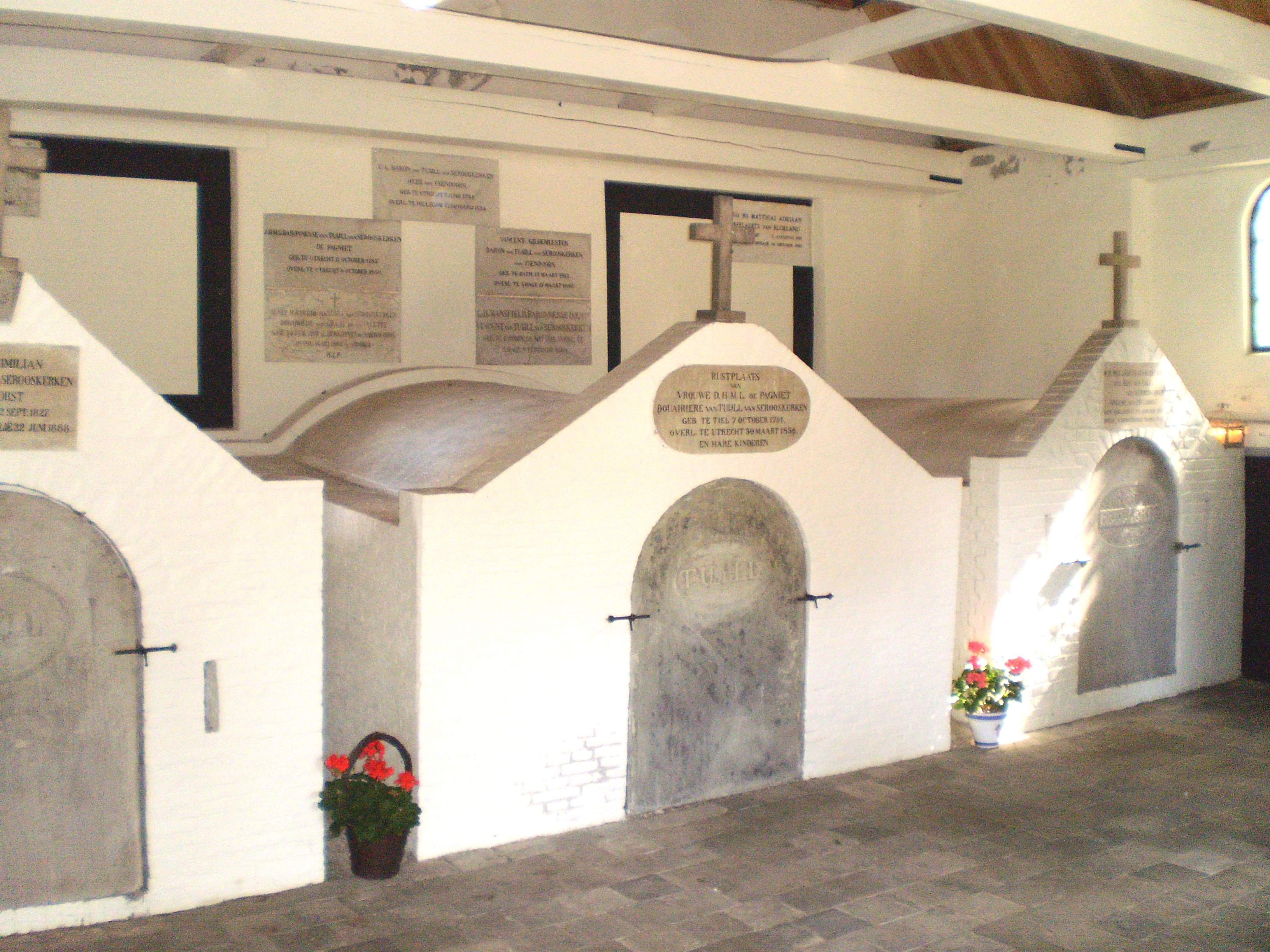 binnenyn Coelhorst